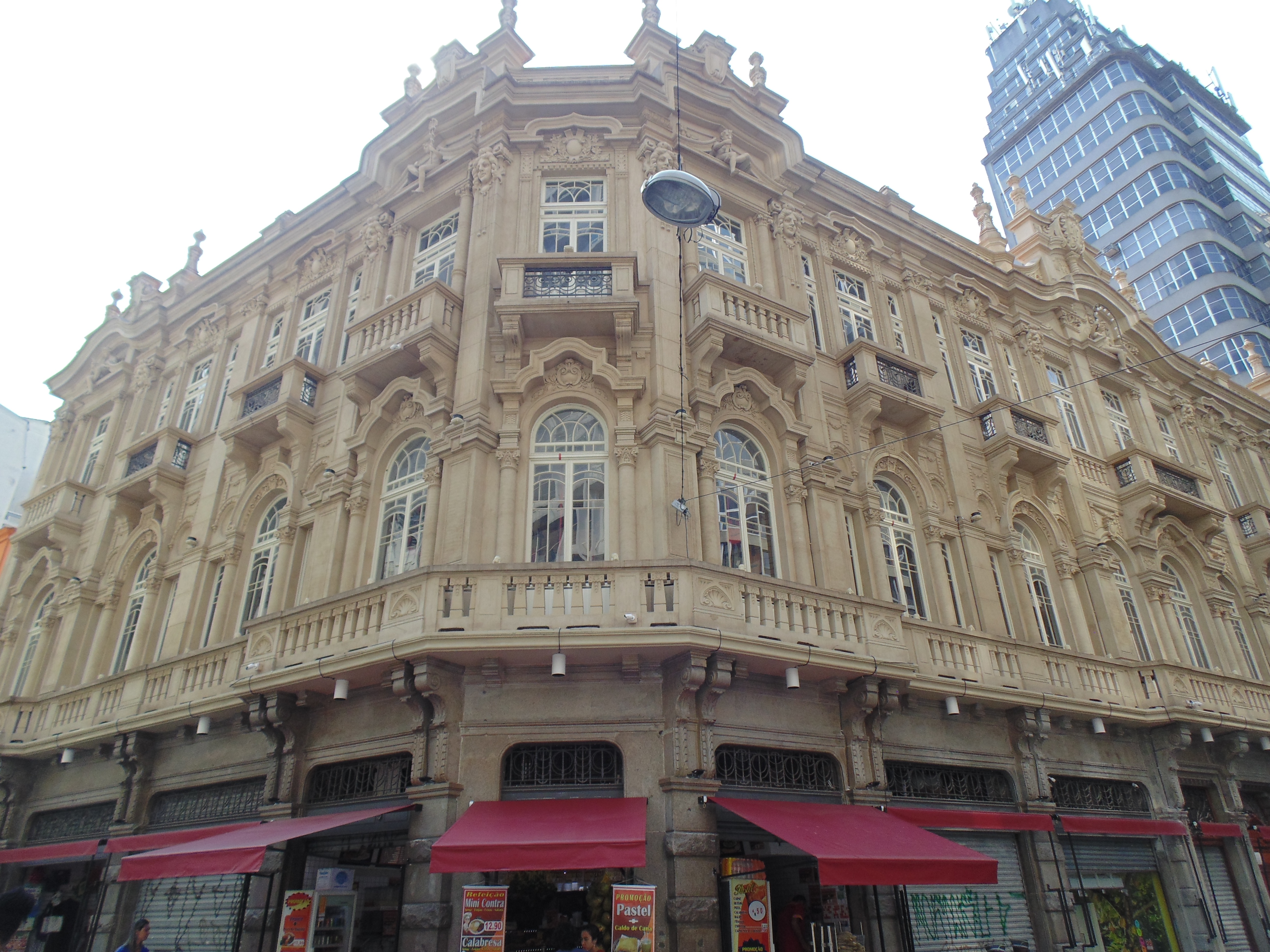 Fachada do Palacete Tereza Toledo Lara, em São Paulo (SP), Brasil